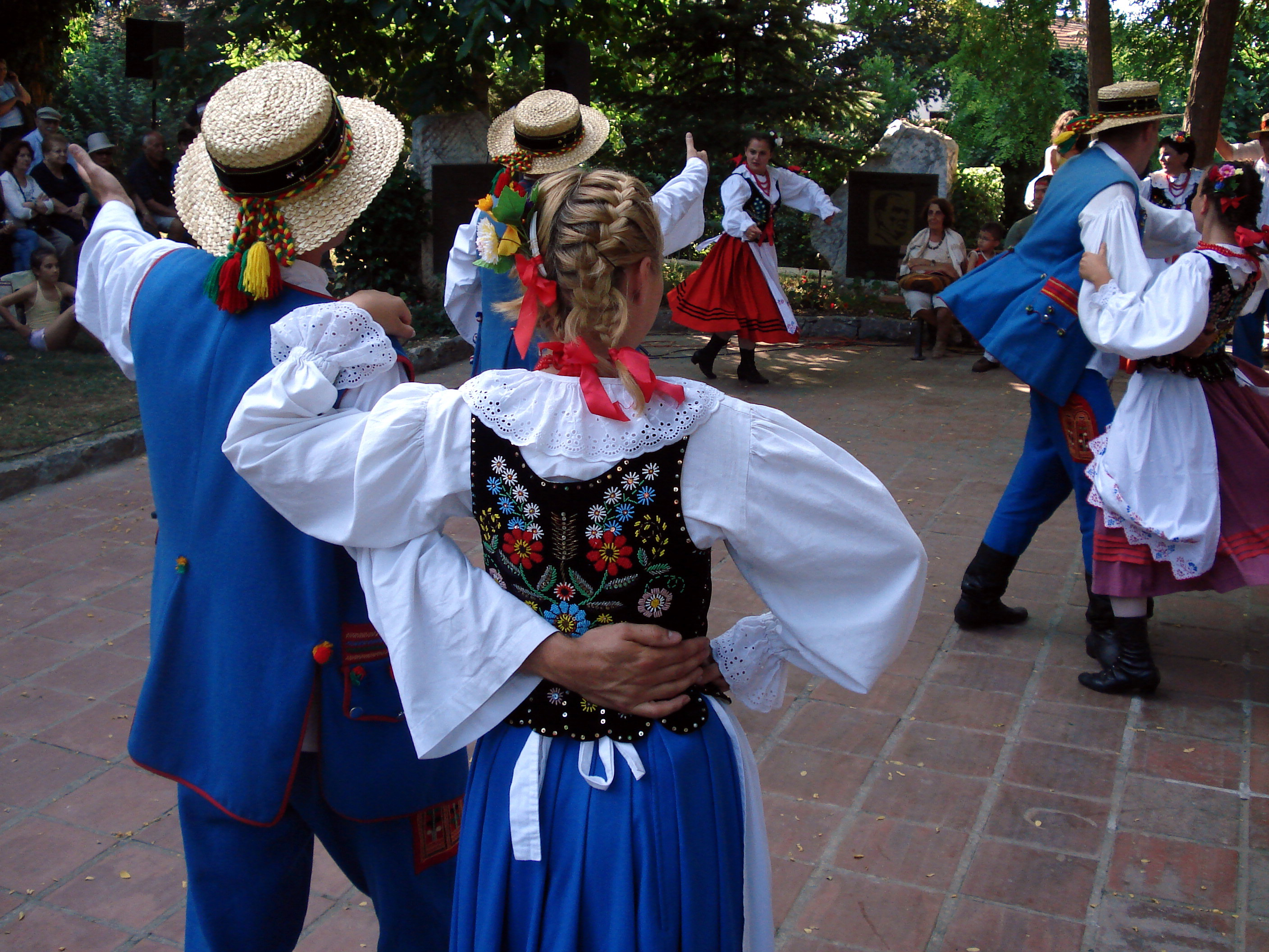 Polonezköy "Kiraz" Festival, Wałbrzych group